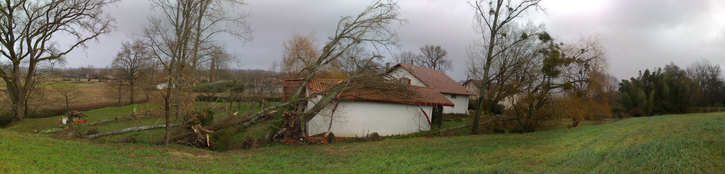 Un garage sous les peupliers à Pomarez (40). Conséquence de la tempête Klaus du 24 janvier 2009.